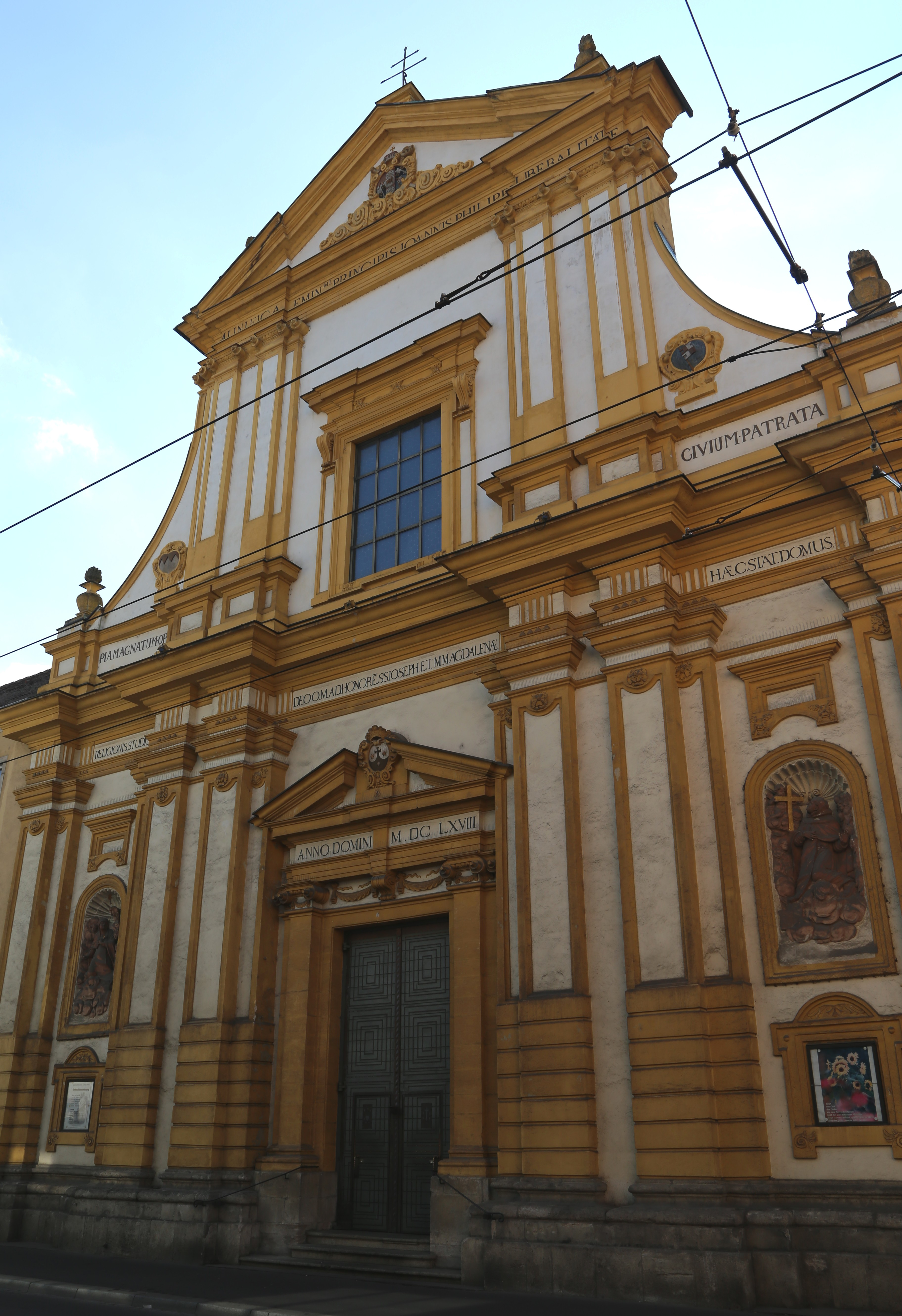 Sanderstraße 12, Würzburg; Katholisches Reuererkloster, ehemaliges Reuererkloster, seit 1627 katholisches Kloster der Unbeschuhten Karmeliten, Klosterkirche, kreuzförmige Wandpfeilerbasilika, mit kräftig gegliederter Blendfassade und schlankem seitlichem Chorturm mit Vierkant-Kupferhaube, Frühbarock, Antonio Petrini, 1662–1669, Wiederherstellung nach 1945; mit Ausstattung